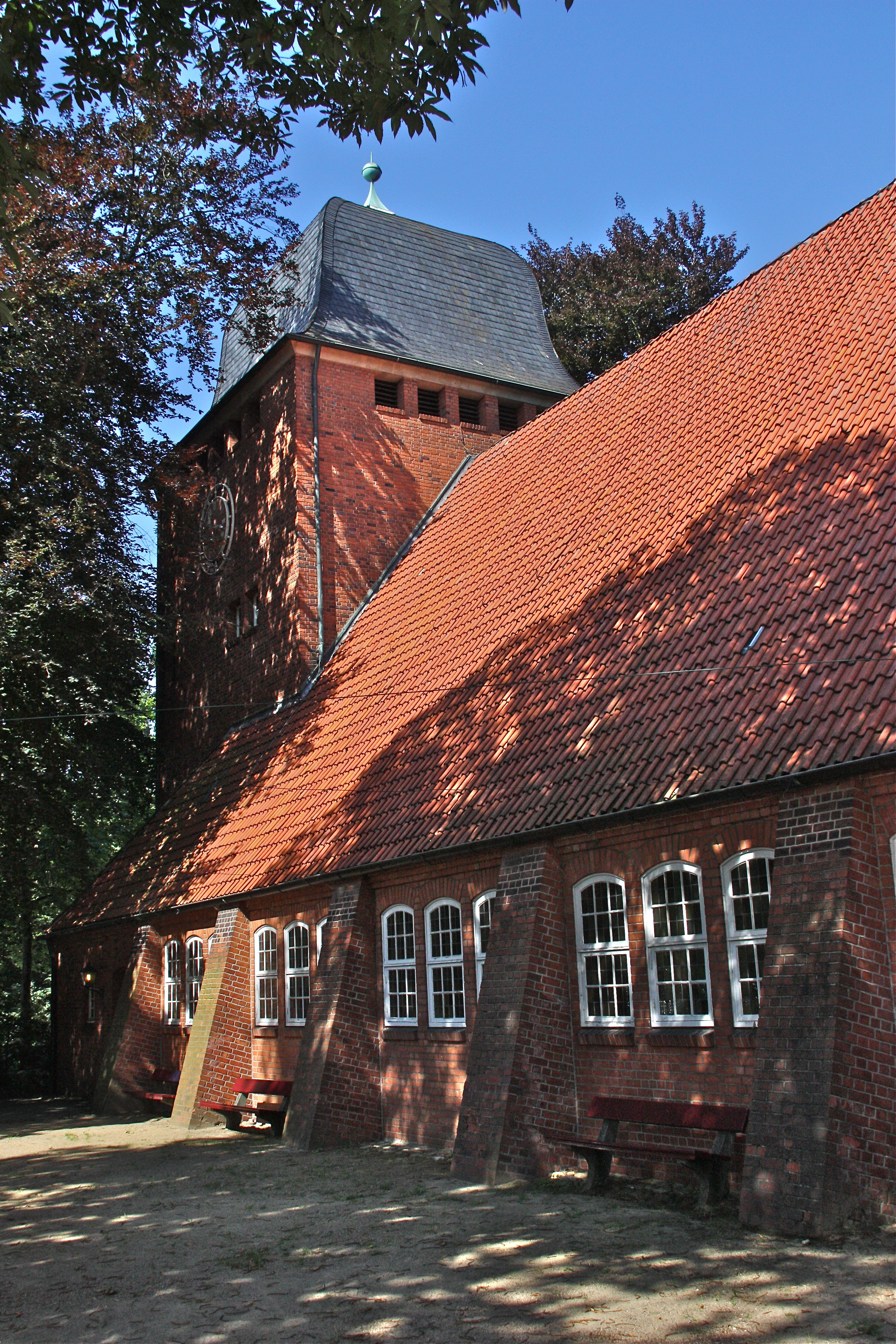 Hamburg, Fuhlsbüttel, Kirche St. Lukas, Turm von Süden